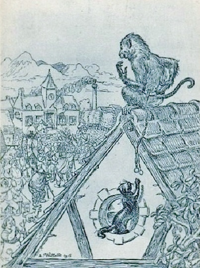 Adolphe Léon Willette : dessin représentant Plougasnou depuis la maison de Ker Maria (Ker Willette), datant de 1915.